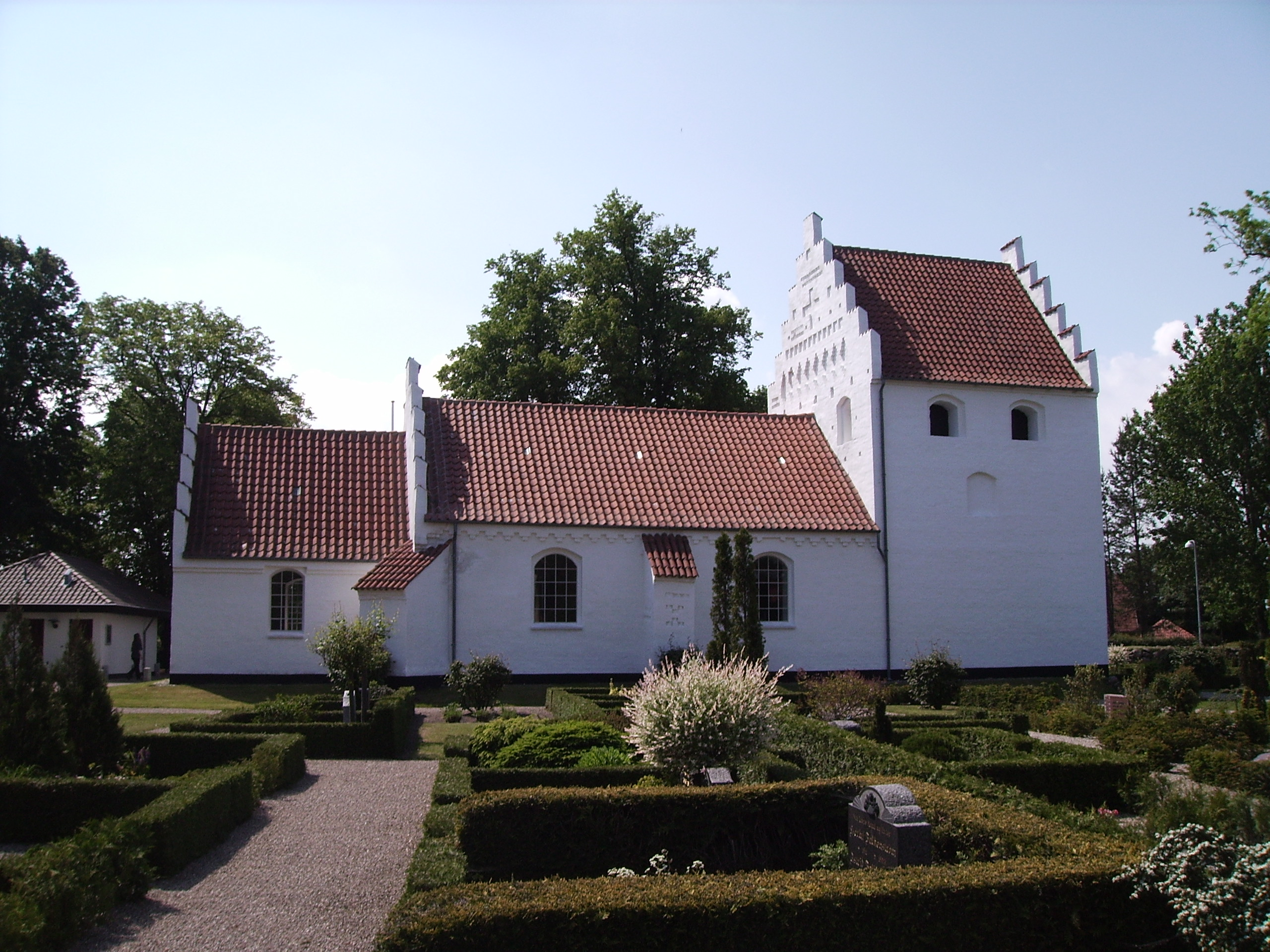 Agedrup Kirke, Agedrup Sogn, Bjerge Herred, Odense Amt, Denmark (Danish Church) - Agedrup Kirkes fra nordøst